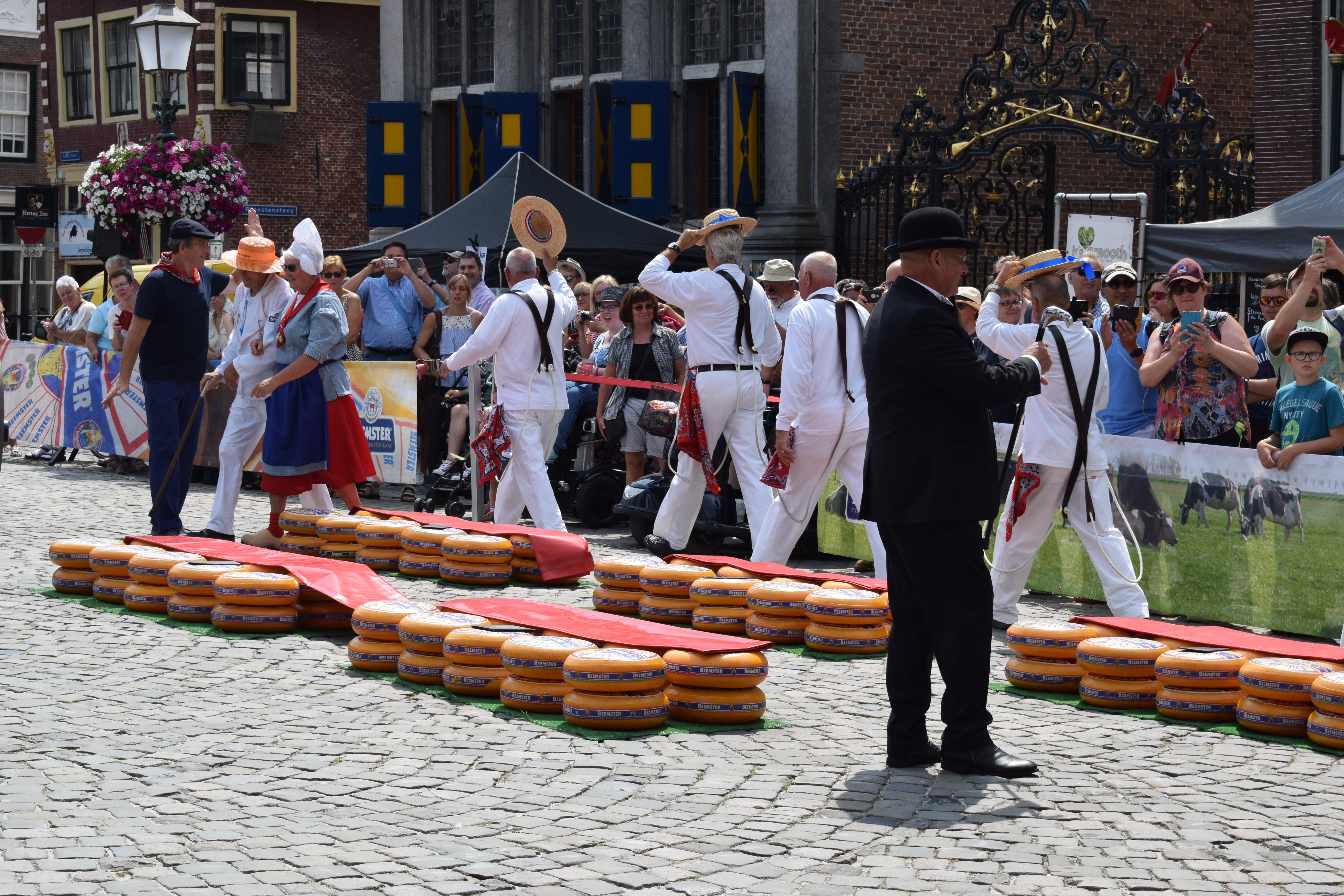 Vue de Hoorn en Frise (Pays-Bas).